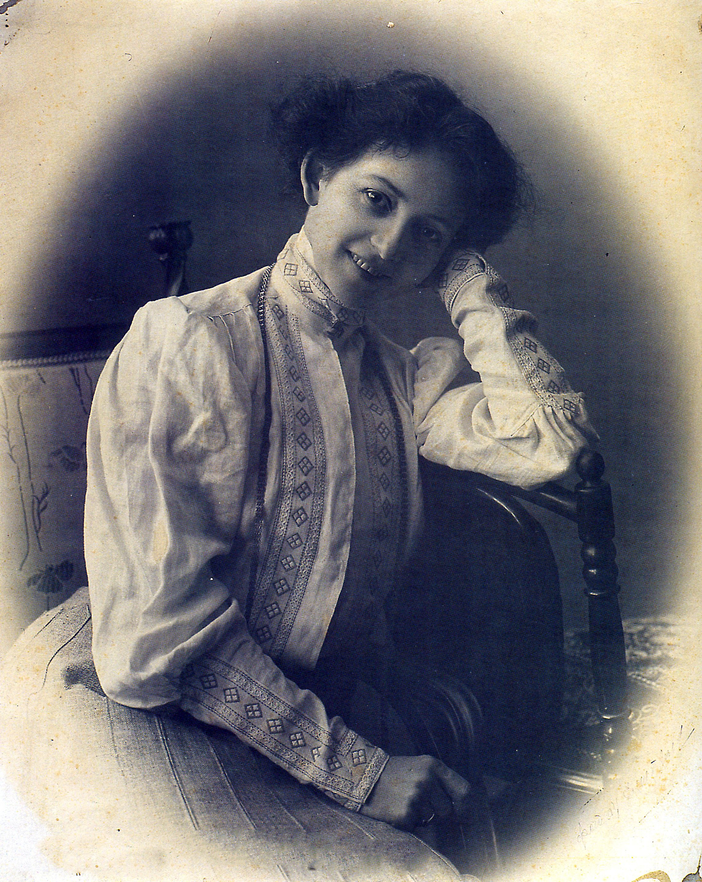 Комиссаржевская, Вера Фёдоровна